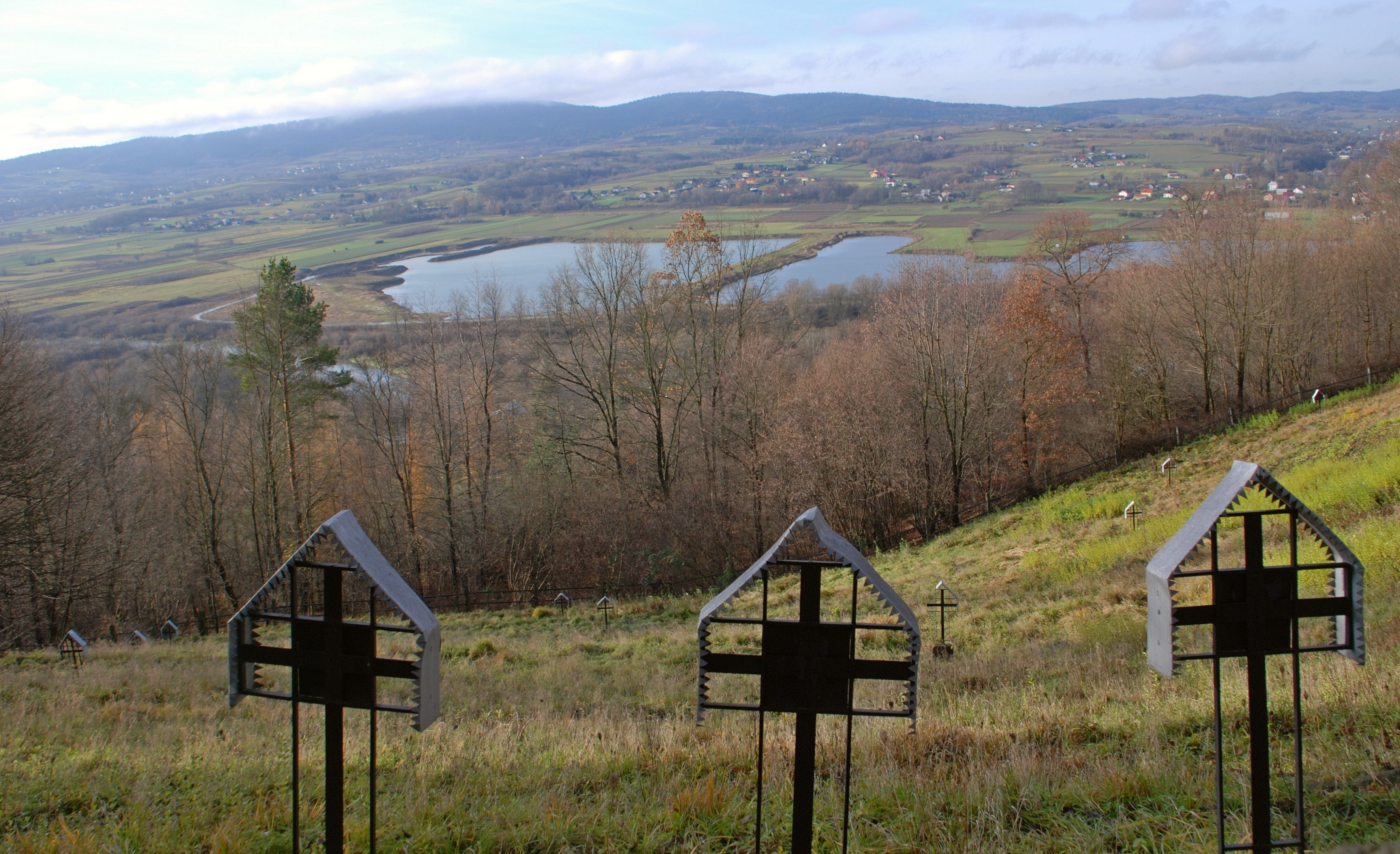 wieś Bukowa